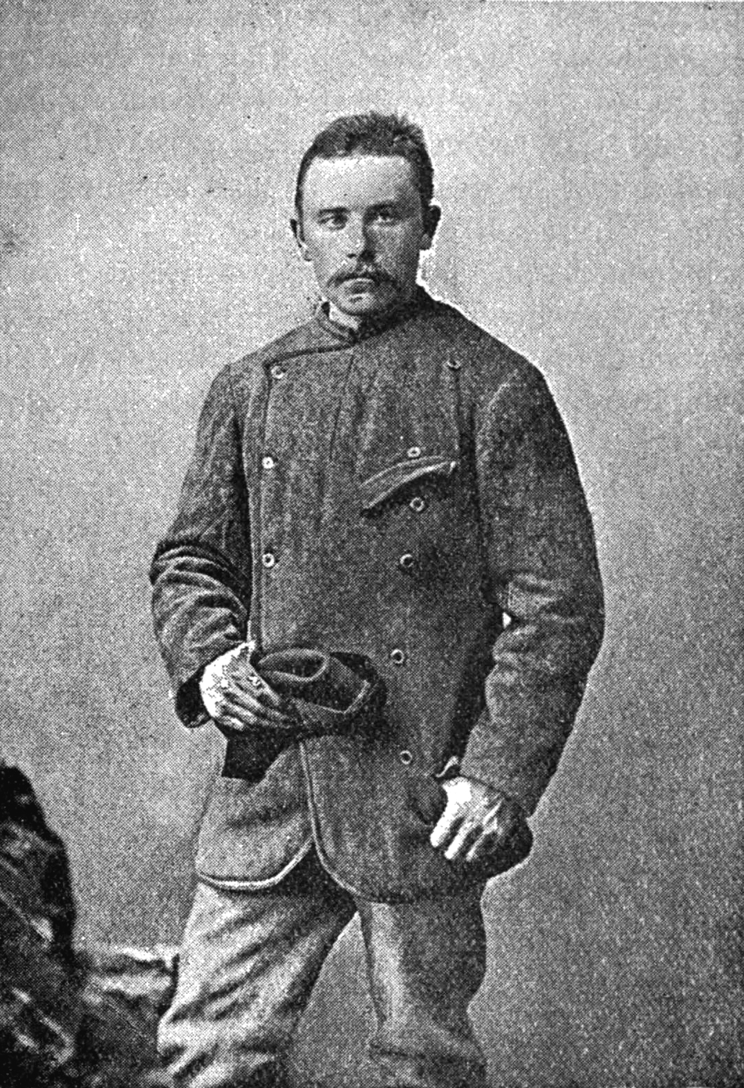 Кристиан Кристиансен - норвежский полярник, участник гренландской экспедиции Нансена